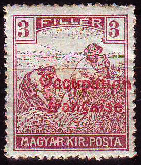 Почтовая марка французской оккупационной администрации Арада